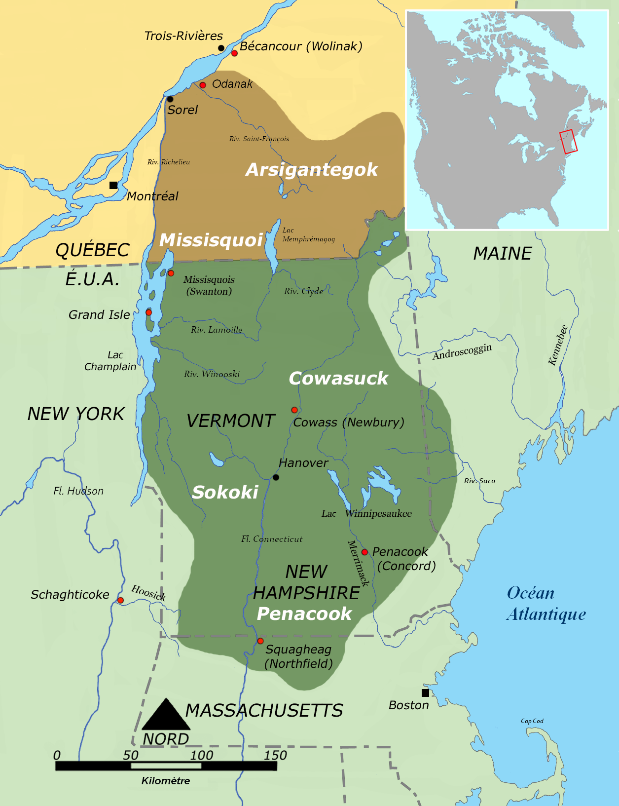 Aire co-territoriale abénaki